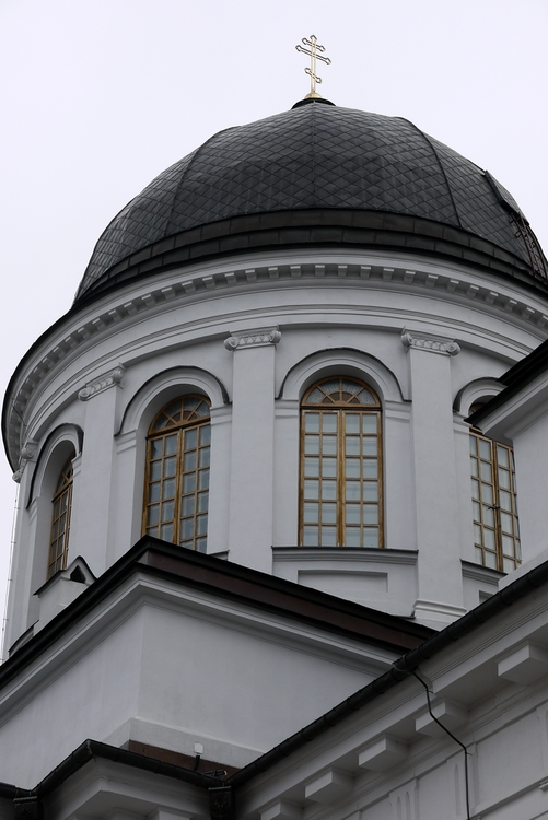 Białystok. Kopuła katedry prawosławnej